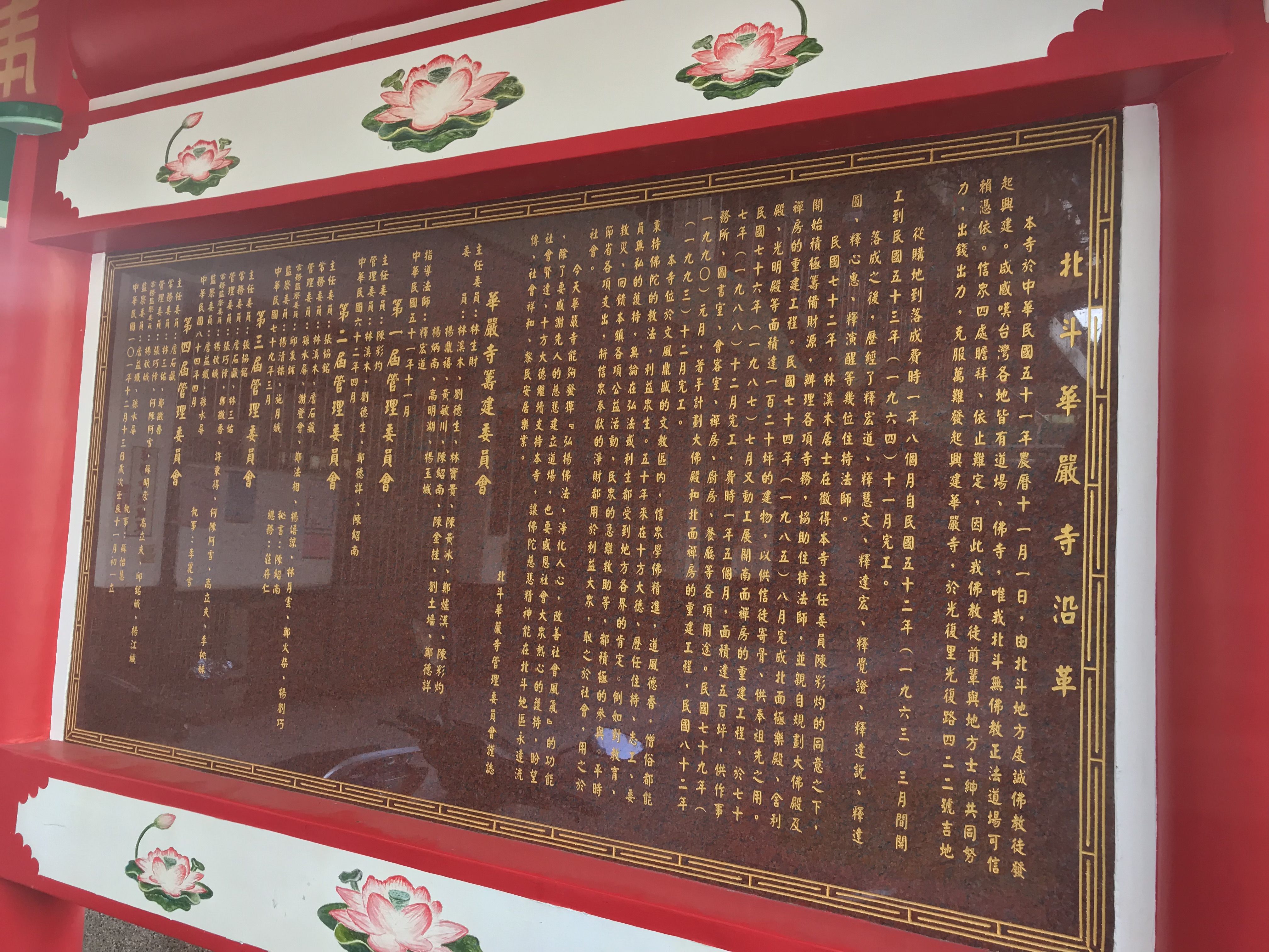 北斗華嚴寺沿革